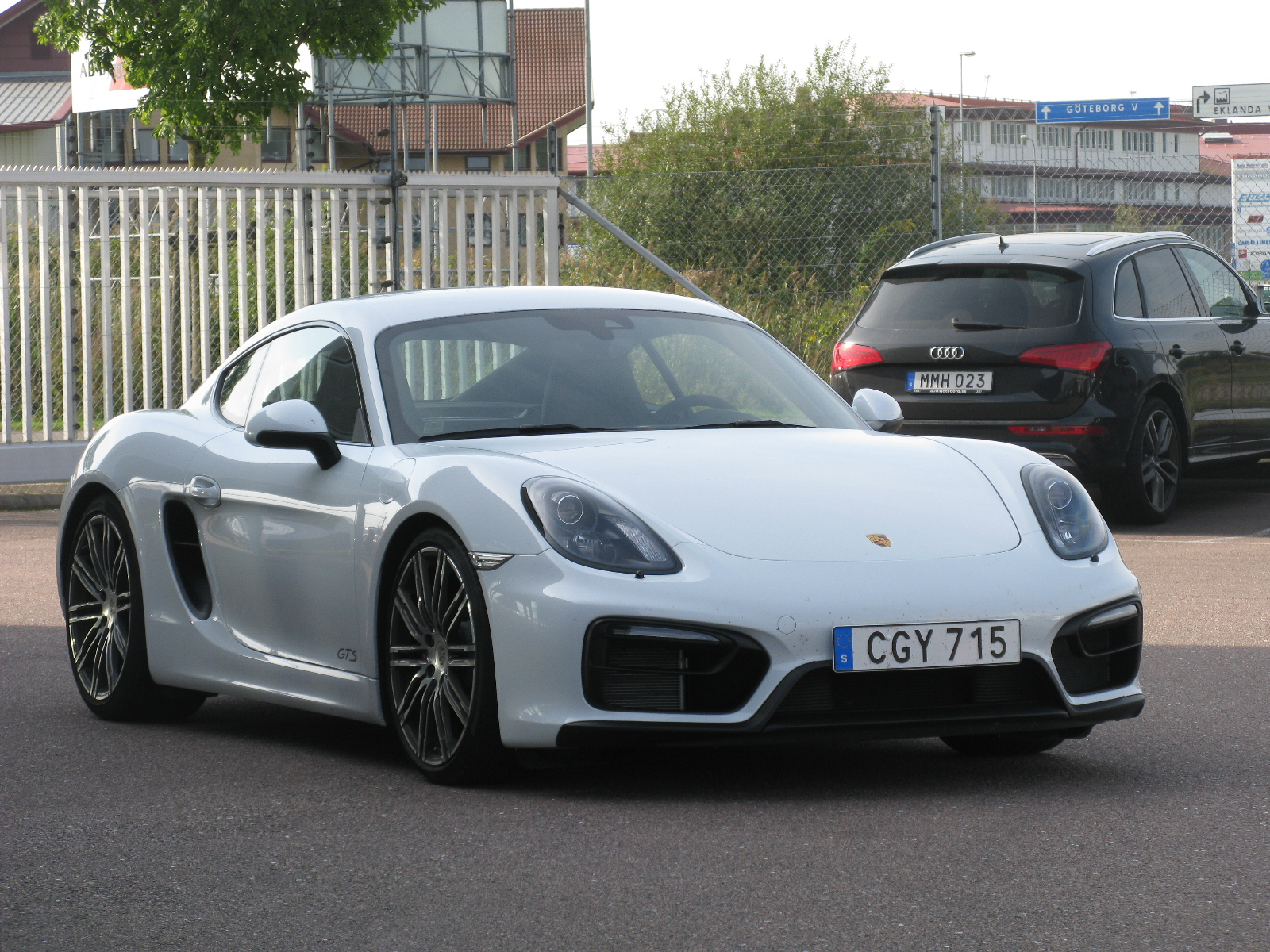 Porsche Cayman GTS